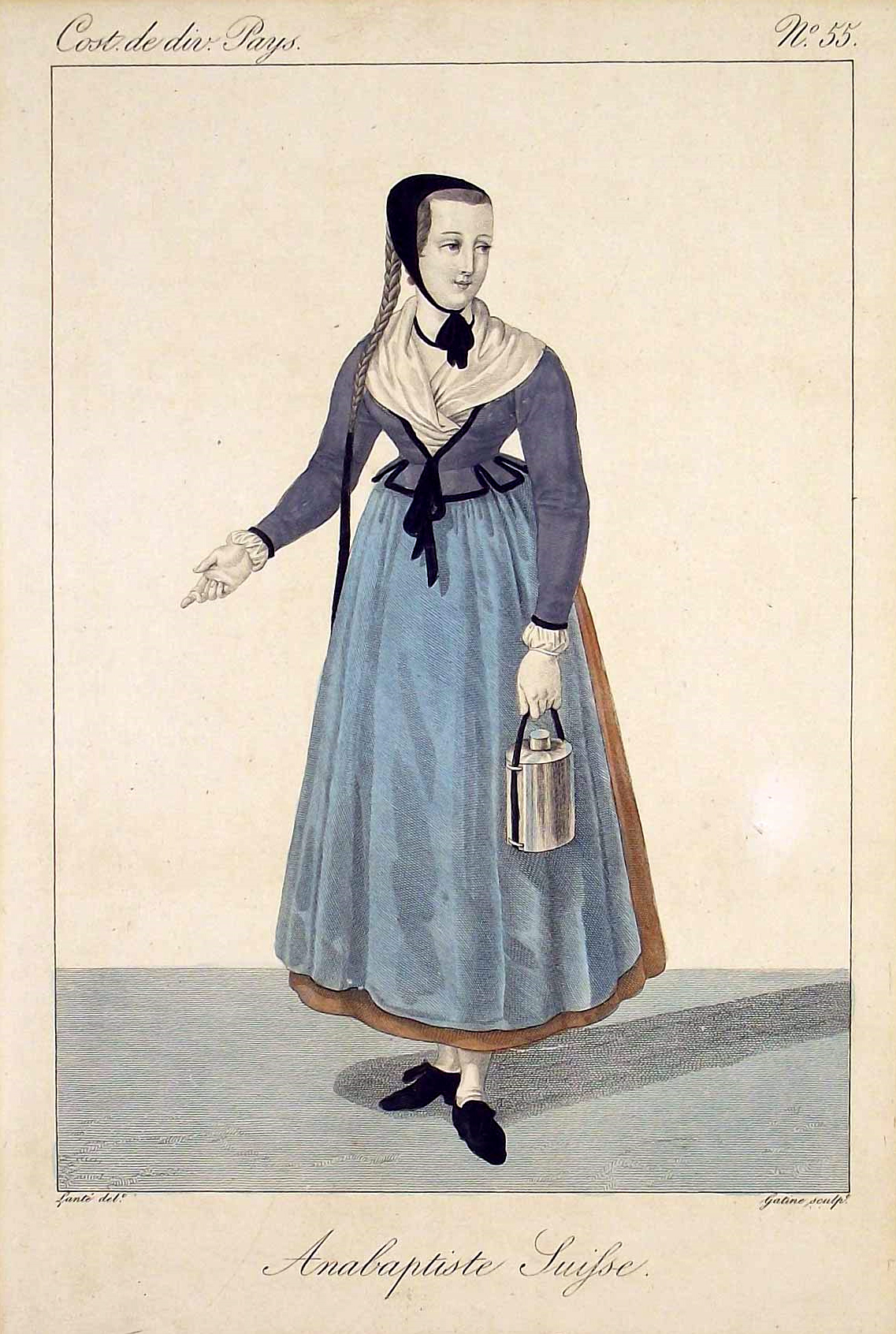 "Anabaptiste Suisse". Kupferstich v. Gatine nach Lante, um 1820. 23,5 x 16 cm